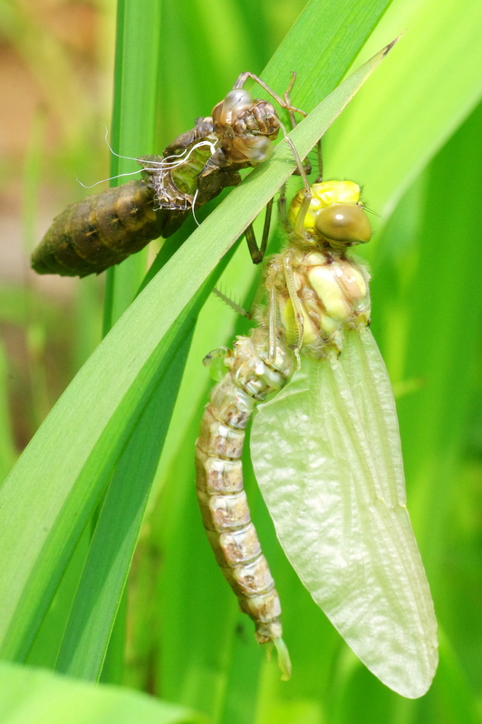 Żagnica sina (Aeshna cyanea) - przeobrażenie. Następuje pompowanie limfy do skrzydeł poprzez żyłki. Skrzydła rozprostowują się.